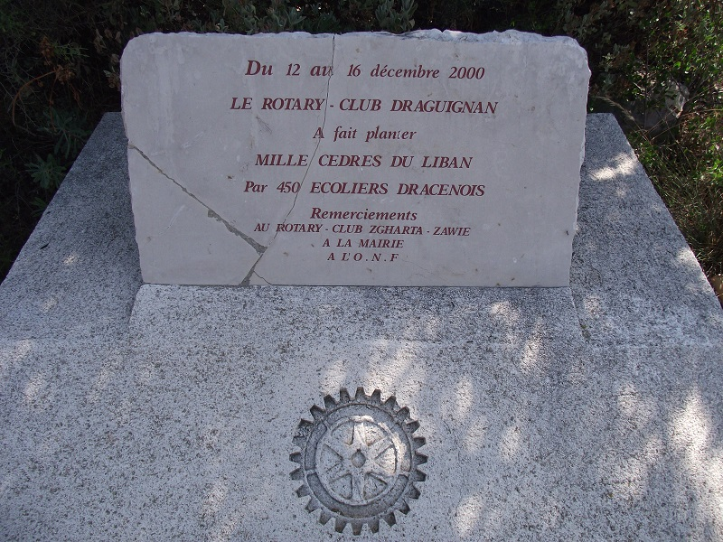 Plaque d'inauguration Rotary au Malmont suite aux plantation de 2000, ville de Draguignan